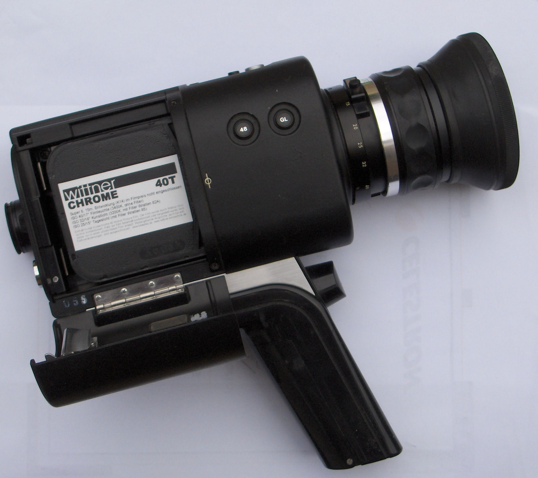 Caméra super 8 mm muette "Revue cokpit" des années 70. En fait il s'agit d'une Chinon en sous marque. Cette caméra possédait de nombreuses fonctions : - Zoom 6 x, macro - Fondu enchaîné (rare en super 8 mm) - fader - vitesse 18 et 28 images secondes - image par image - 48 images secondes pour la fonction de ralenti Cette caméra est équipée d'une cassette de type super 8 mm Wittner T 40 (fabrication arrêtée) photo réalisée par mes soins